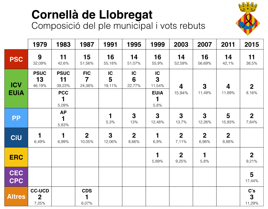 Composició del ple municipal de Cornellà de Llobregat entre el 1979 i el 2019.